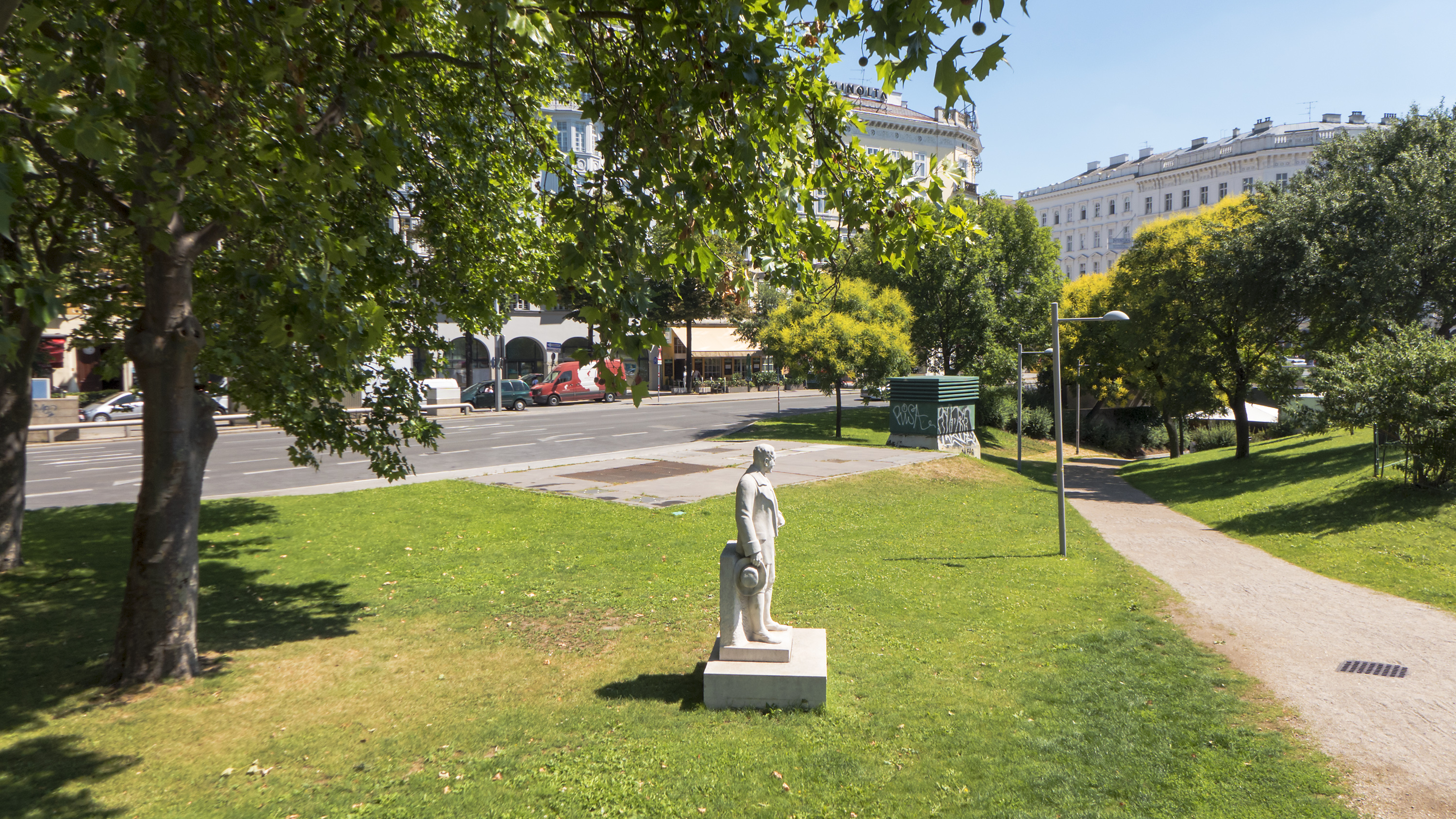 Girardipark in Wien 1